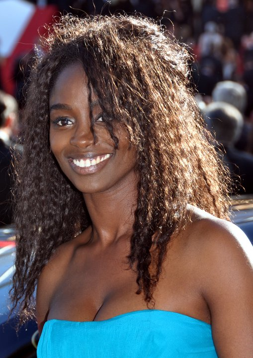 Aïssa Maïga au festival de Cannes